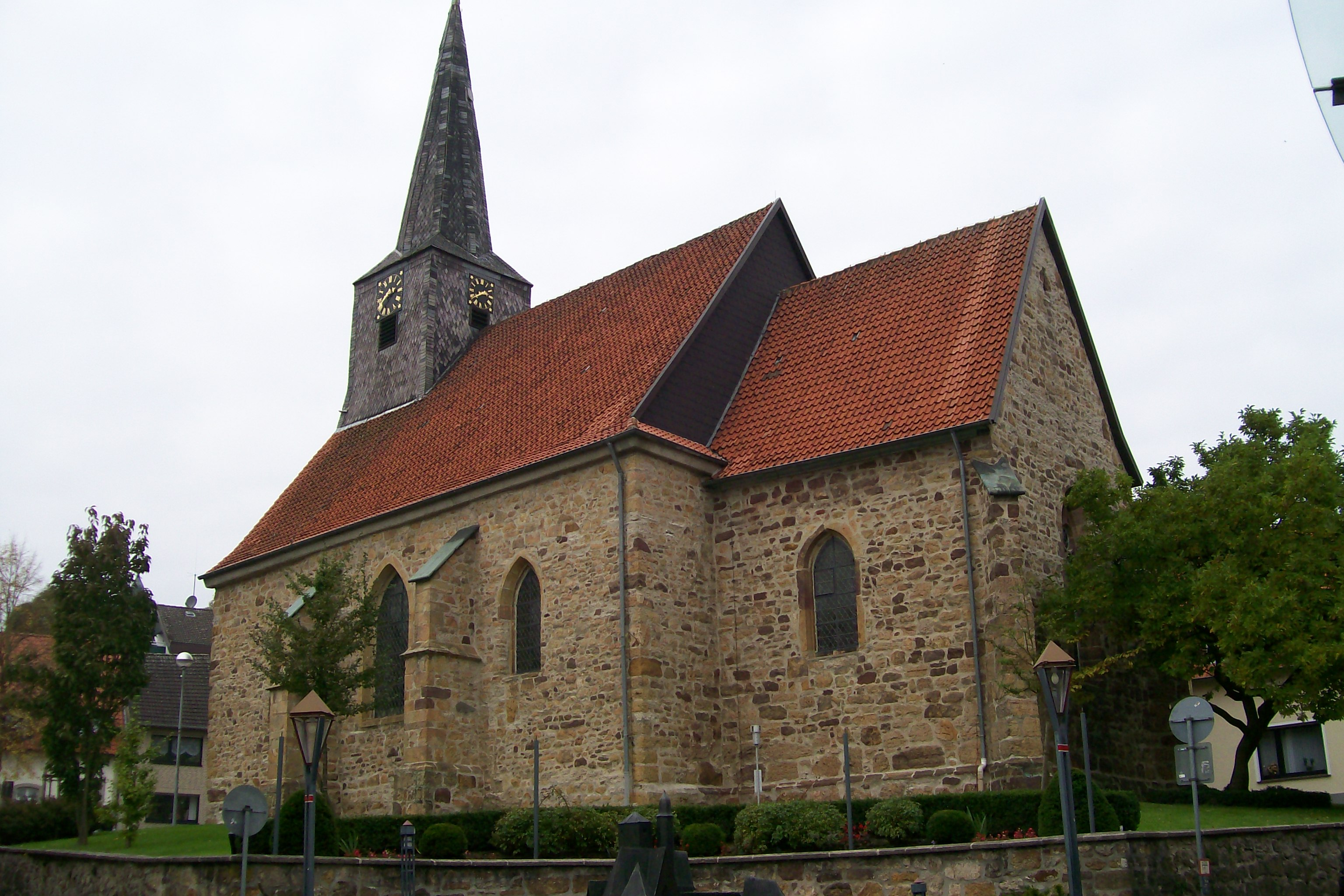 Fleckenskirche St. Nikolaus in Bad Iburg, Niedersachsen, 1226